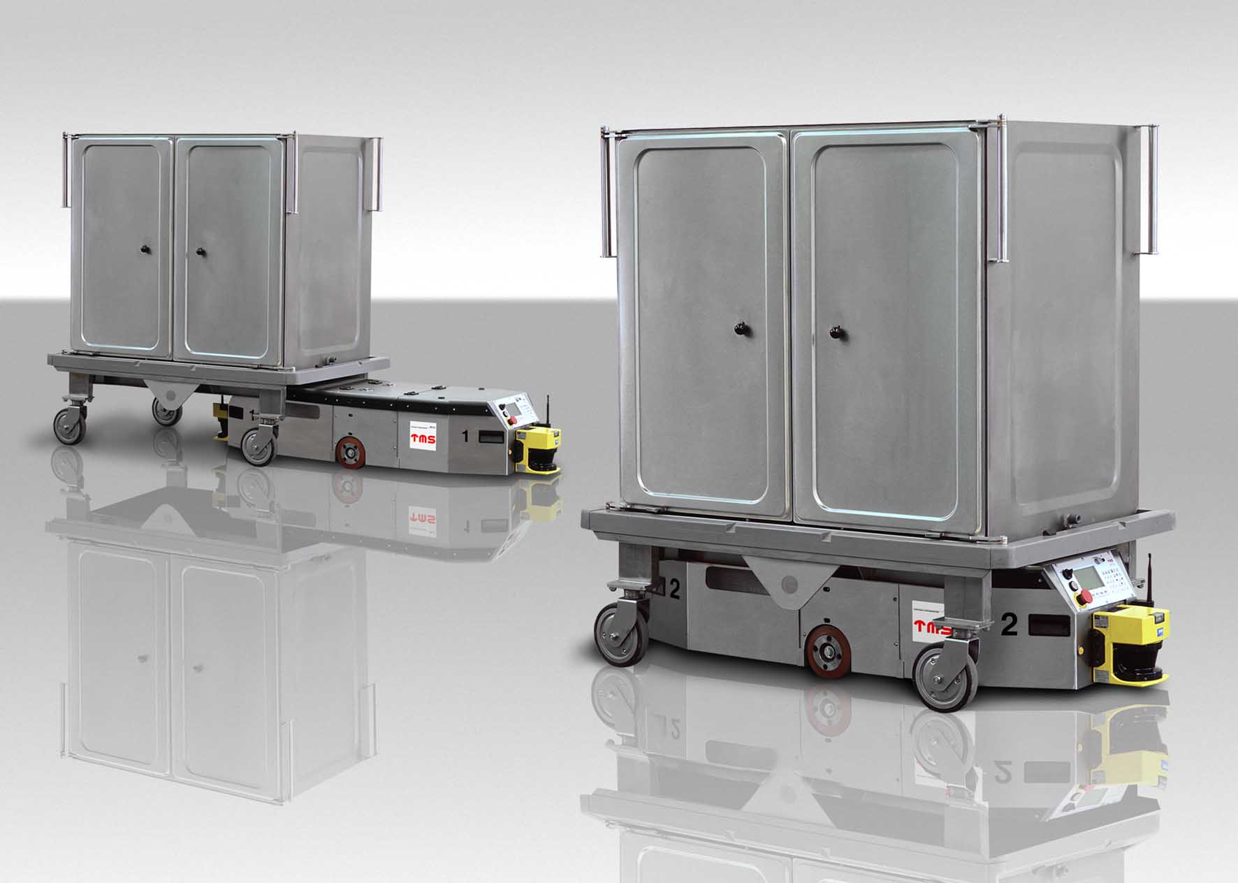 FTF als Unterfahrschlepper, Ausführung in Edelstahl, Einsatz im Krankenhaus, Ver- und Entsorgung der Stationen: automatischer Transport von Rollcontainern für Wäsche, Essen, Medikamente etc.